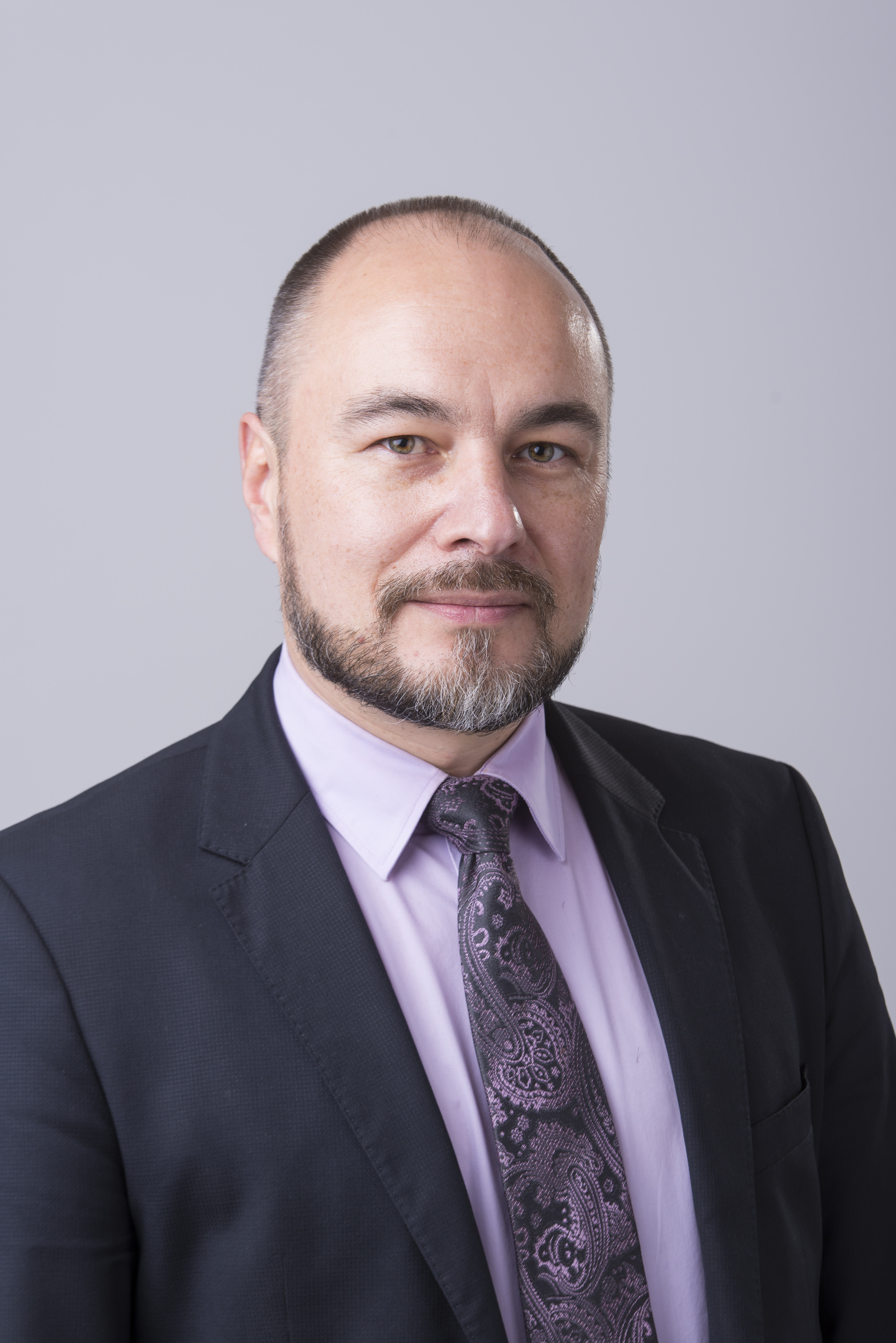 2014.gada 9.decembris. 12.Saeimas deputāts Imants Parādnieks. Foto: Reinis Inkēns, Saeimas Kanceleja Izmantošanas noteikumi: saeima.lv/lv/autortiesibas